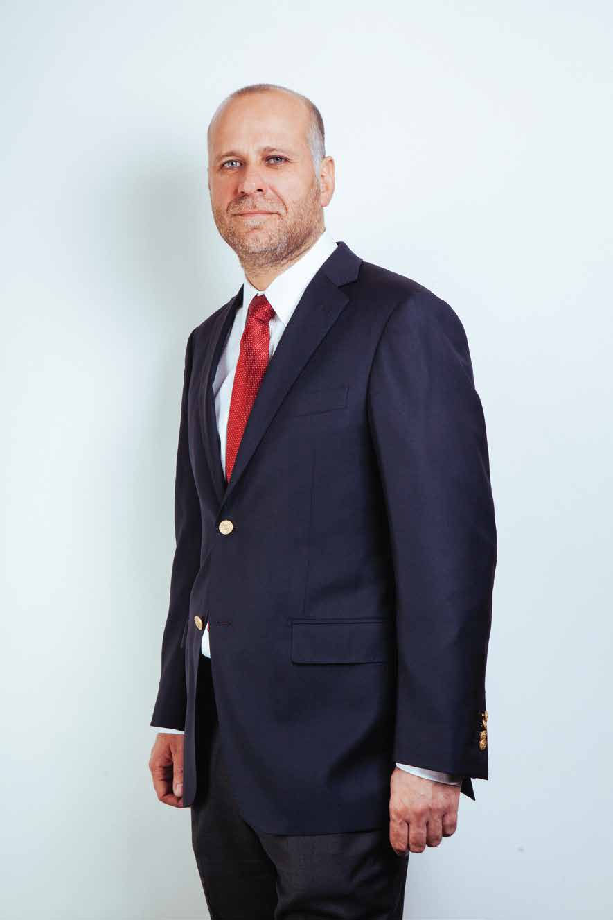 Ministro de Estado del segundo gobierno de Michelle Bachelet (2014-2018)